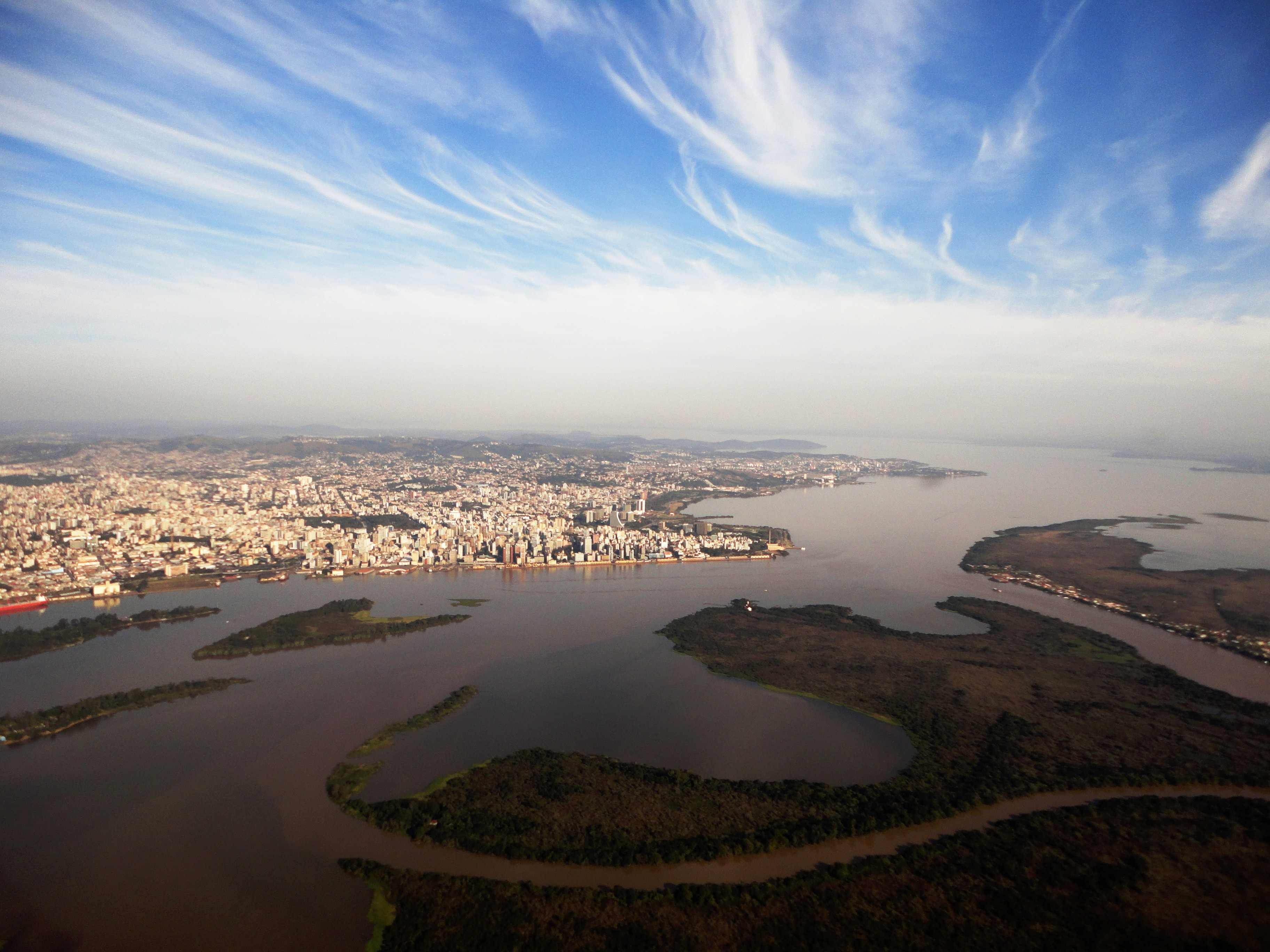 Vista aérea o rio guaiba e parte da ilhas , com a capital do Rio Grande do Sul , Porto Alegre